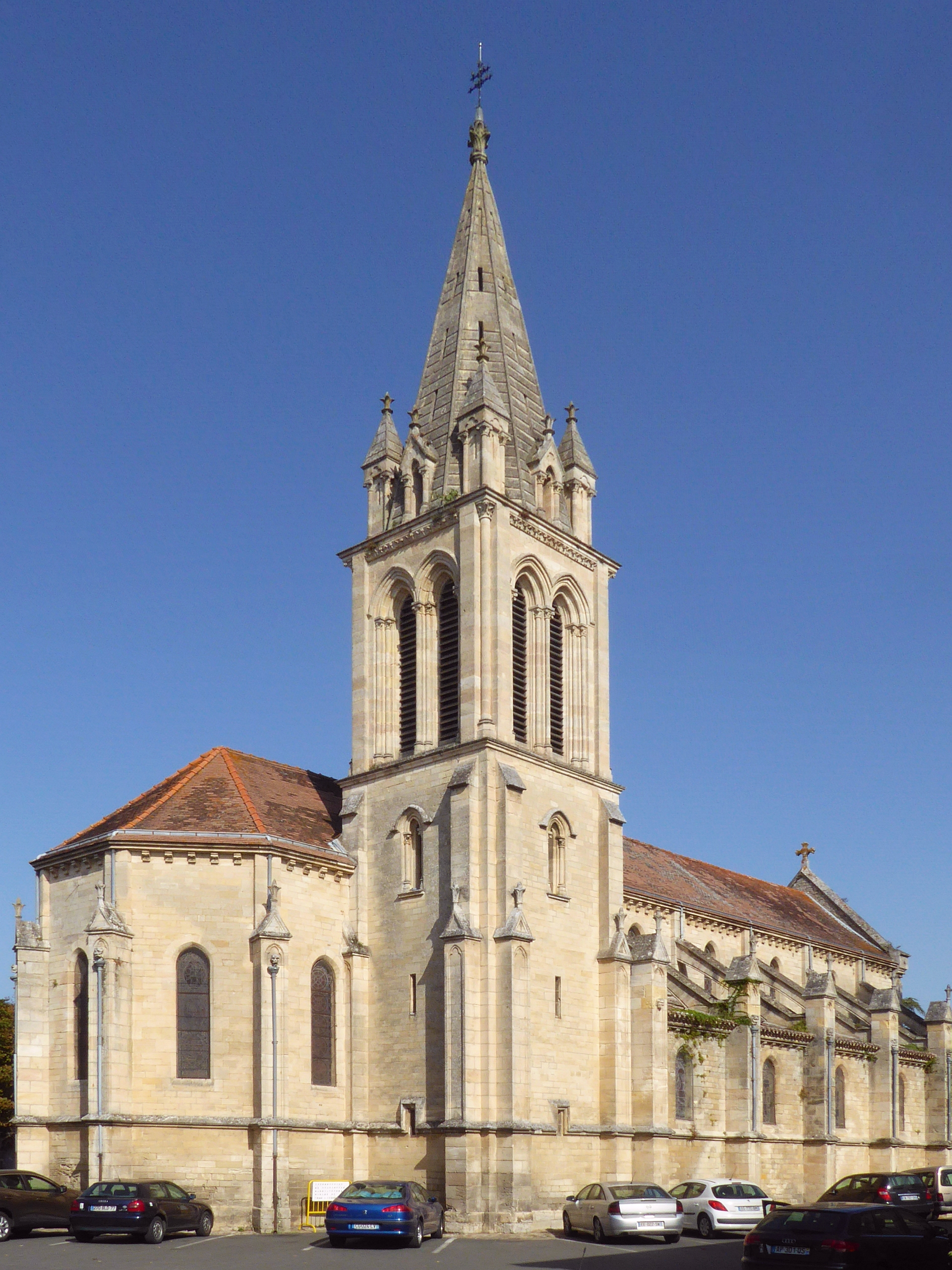 Neugotisch Kirche v 1856 Église St Géronce de Bourg Place du District in Bourg an der Dordogne in Frankreich Lat 45.040 Lng -0.5603 - Fot W. Pehlemann P1170475